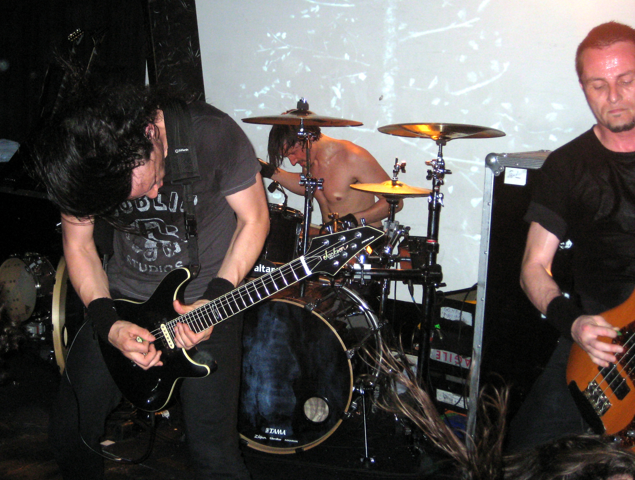 Gojira live @ Nachtleben, Frankfurt/Main